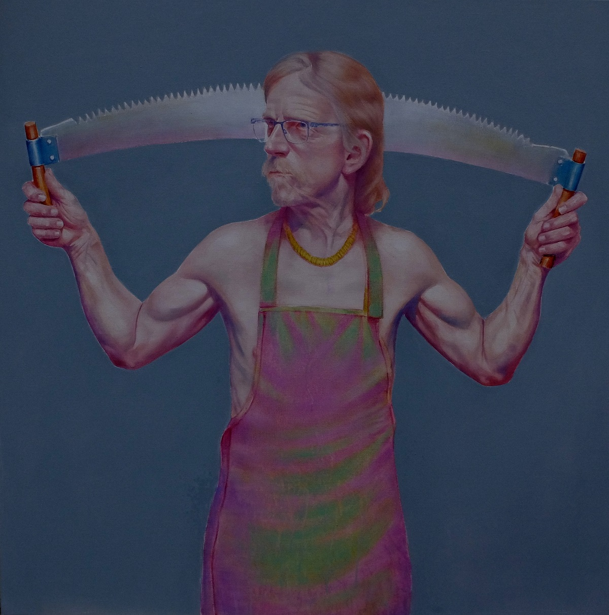 Sylwester Stabryła, Tytan, olej na płótnie, 120x120cm, 2018r